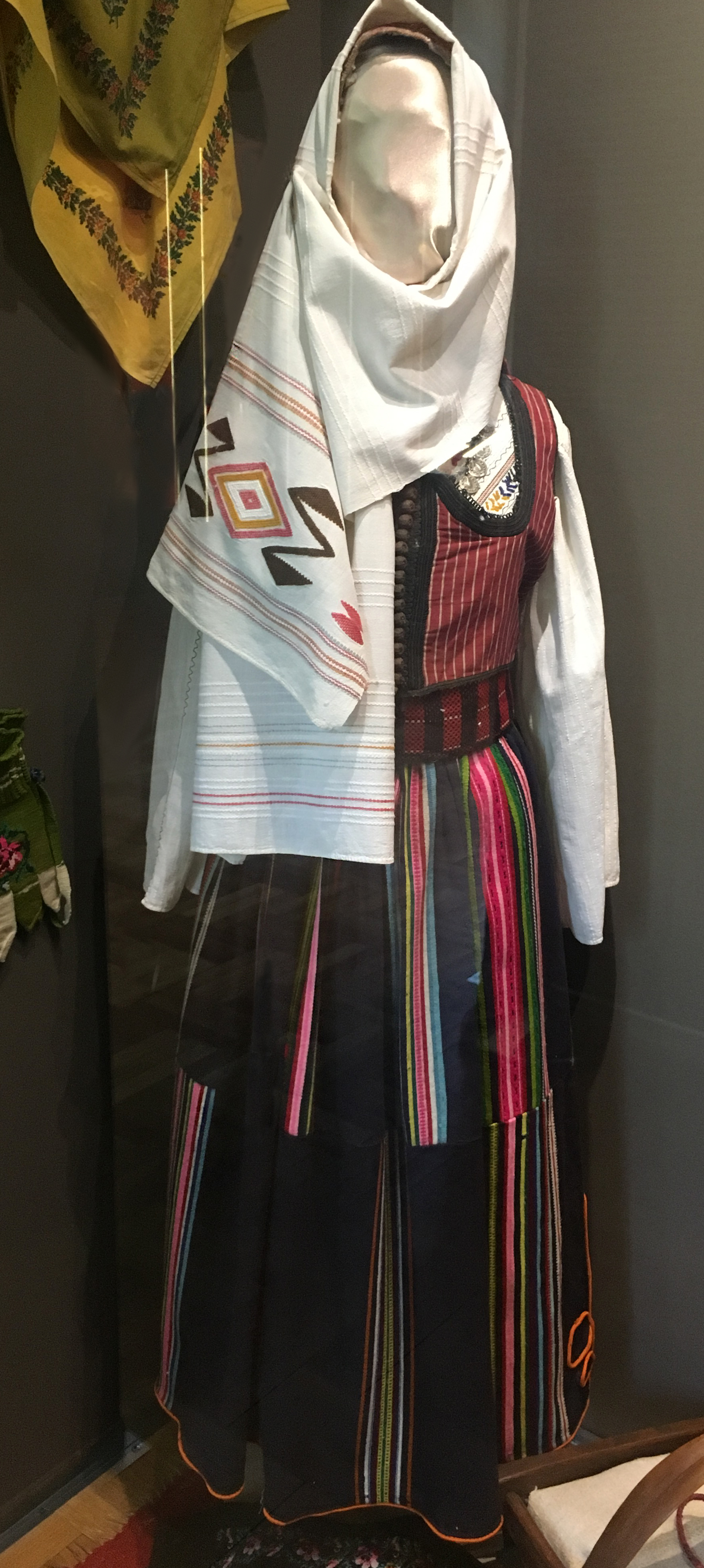 Ženska narodna nošnja izložena u Narodnom muzeju Kruševac.